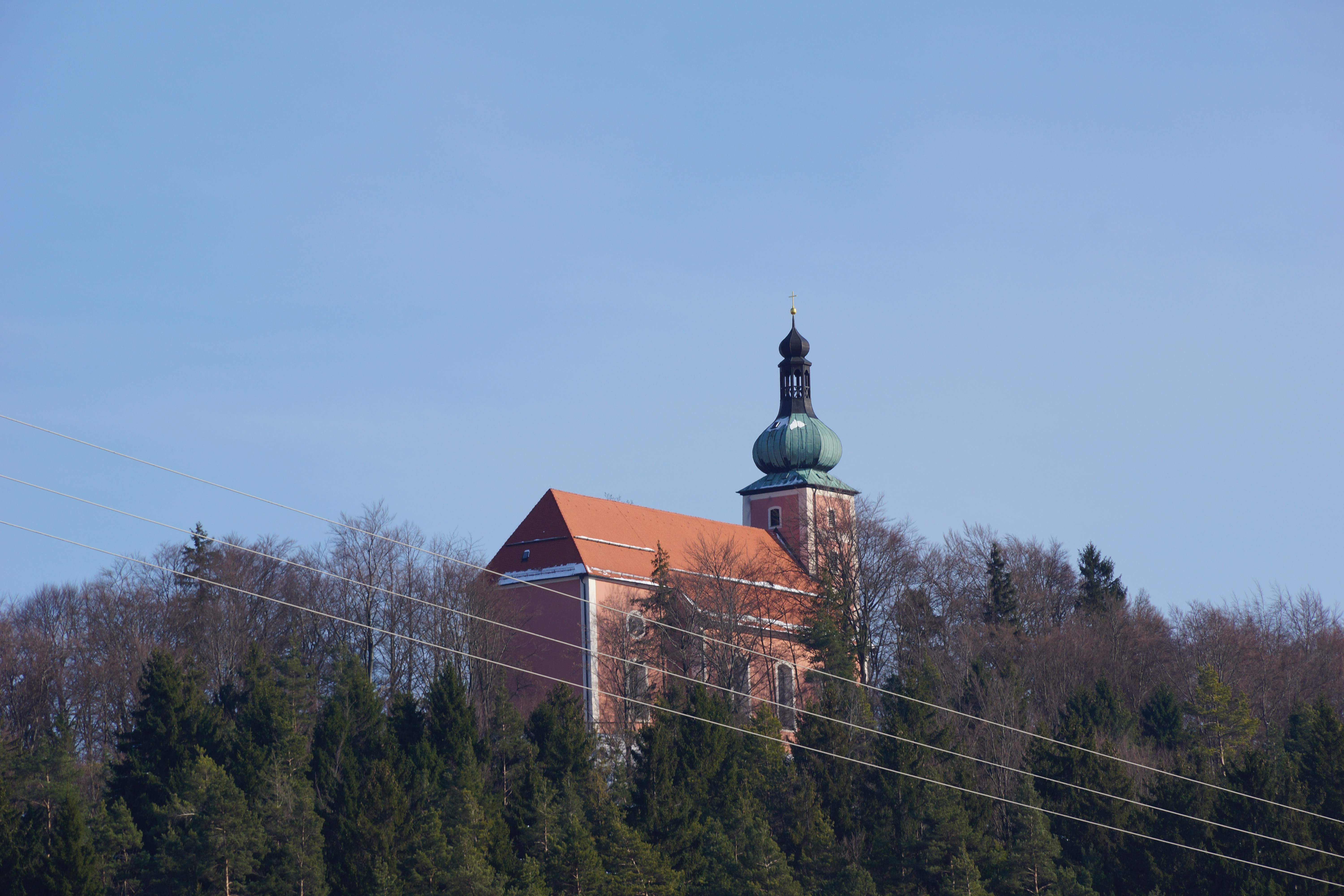 Der Habsberg östlich von Neumarkt